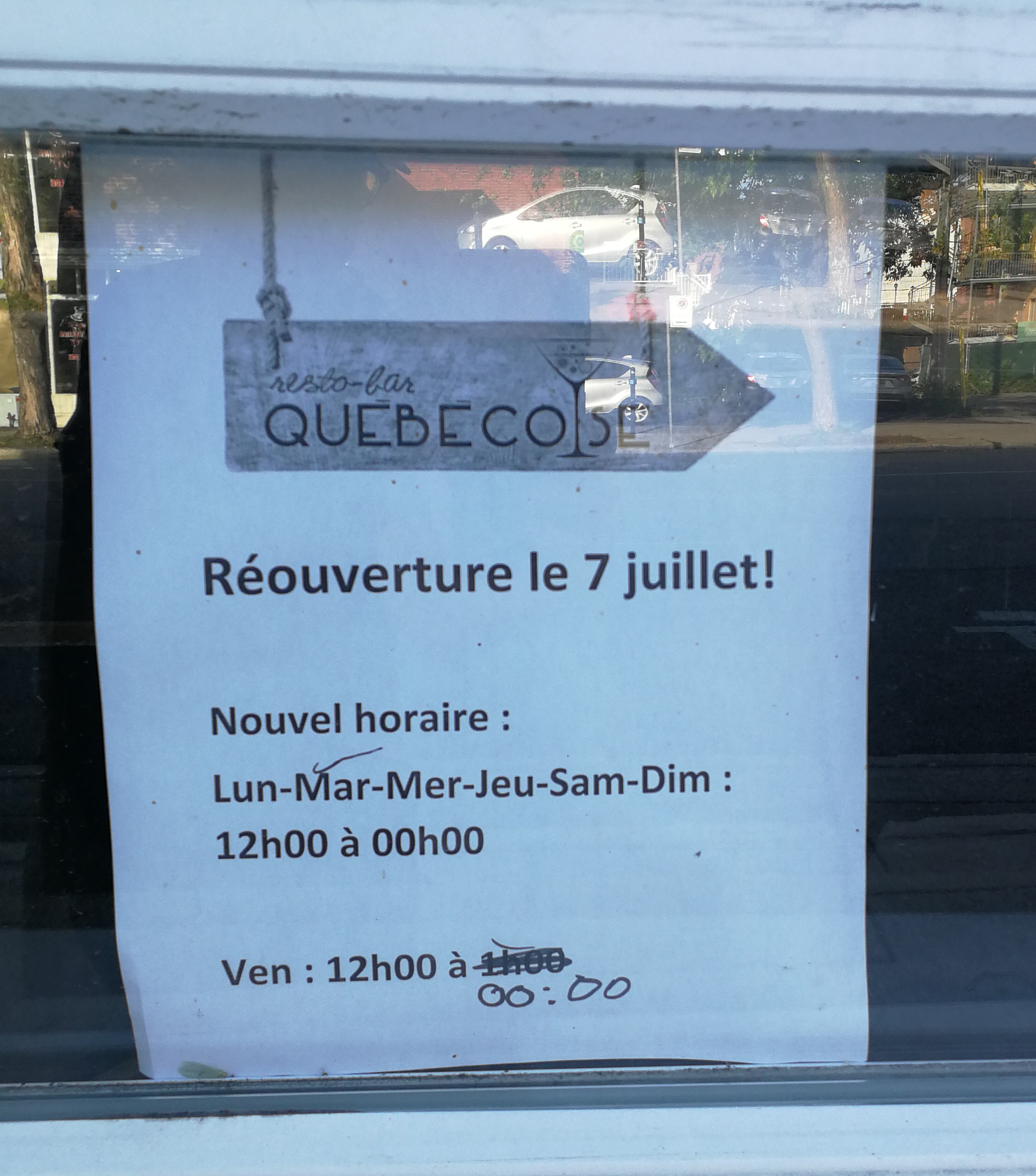 Affiche de la réouverture du resto-bar la Québécoise, le 7 juillet 2020, en pleine pandémie de Covid-19 au Québec.